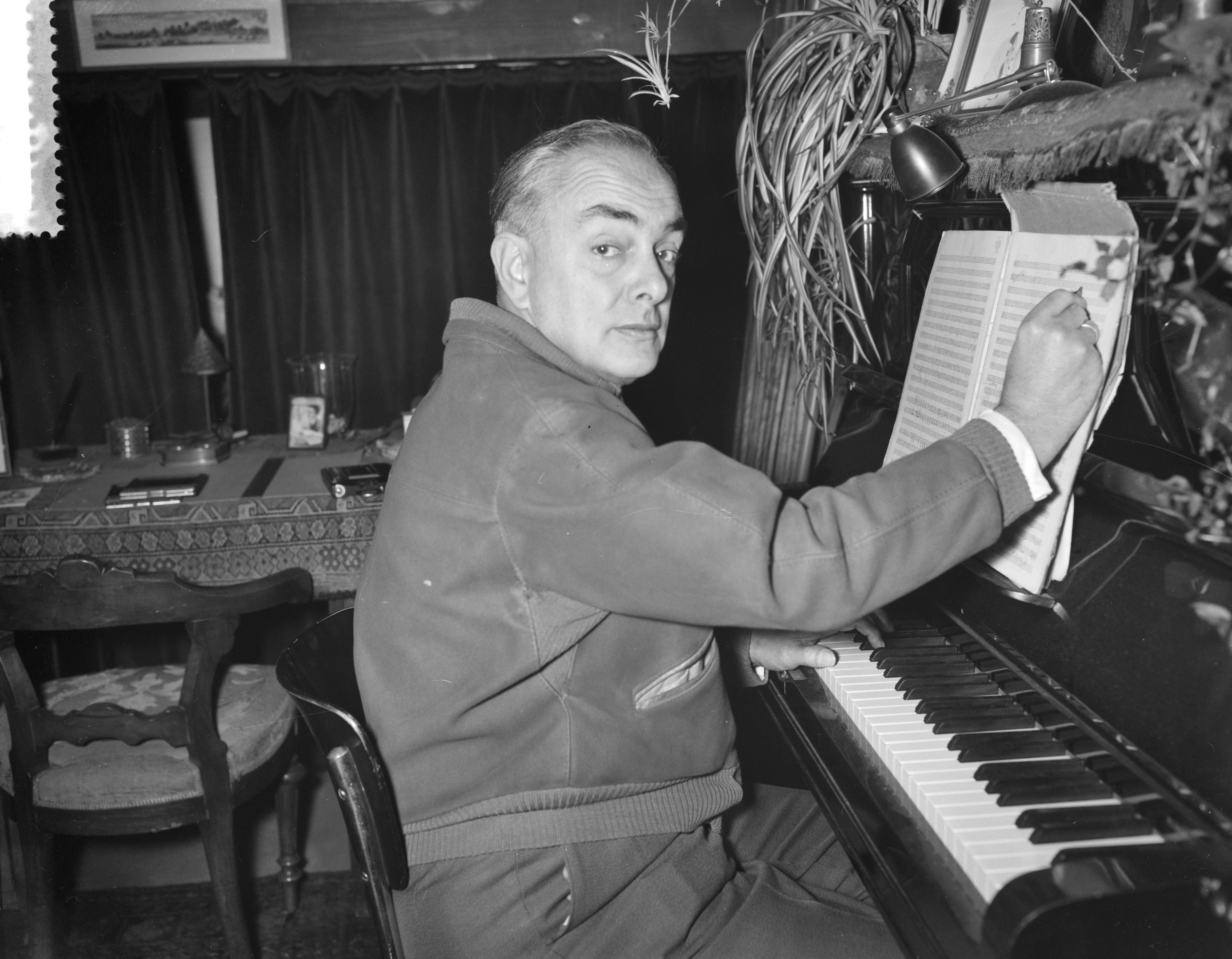 Collectie / Archief : Fotocollectie Anefo Reportage / Serie : [ onbekend ] Beschrijving : Guillaume Landre viert 40-jarig jubileum als componist Guillaume Landre aan de piano Datum : 14 december 1959 Trefwoorden : componisten, jubilea, pianos Persoonsnaam : Guillaume Landre Fotograaf : Bilsen, Joop van / Anefo Auteursrechthebbende : Nationaal Archief Materiaalsoort : Negatief (zwart/wit) Nummer archiefinventaris : bekijk toegang 2.24.01.04 Bestanddeelnummer : 910-8783